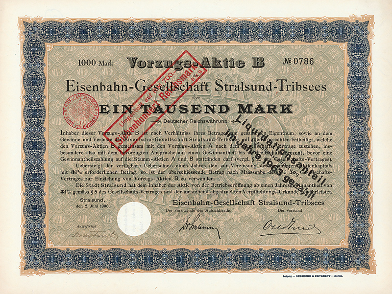 Vorzugsaktie über 1000 Mark der Eisenbahn-Gesellschaft Stralsund-Tribsees vom 2. Juni 1900